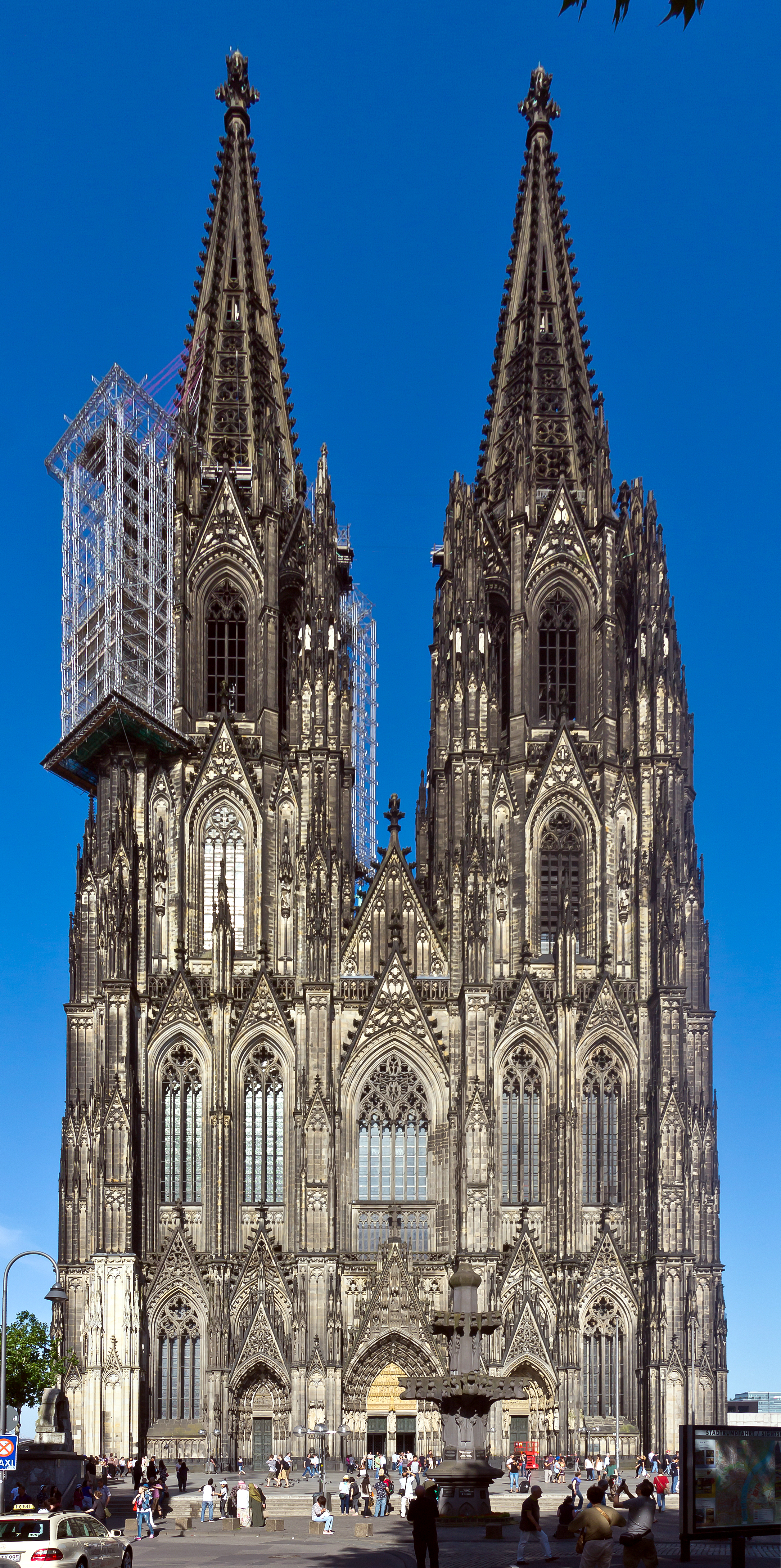 Kölner Dom - WestfassadeThis is a photograph of an architectural monument.